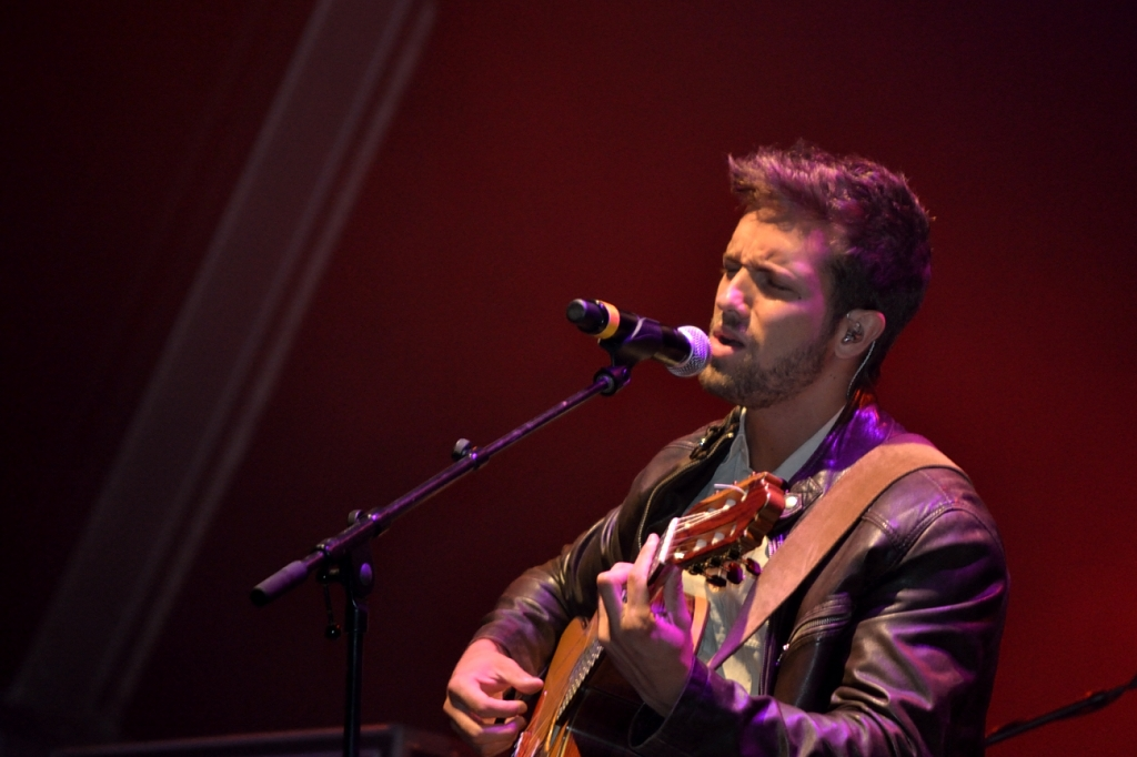 Concerto de Pablo Alboran em Cantanhede, Portugal